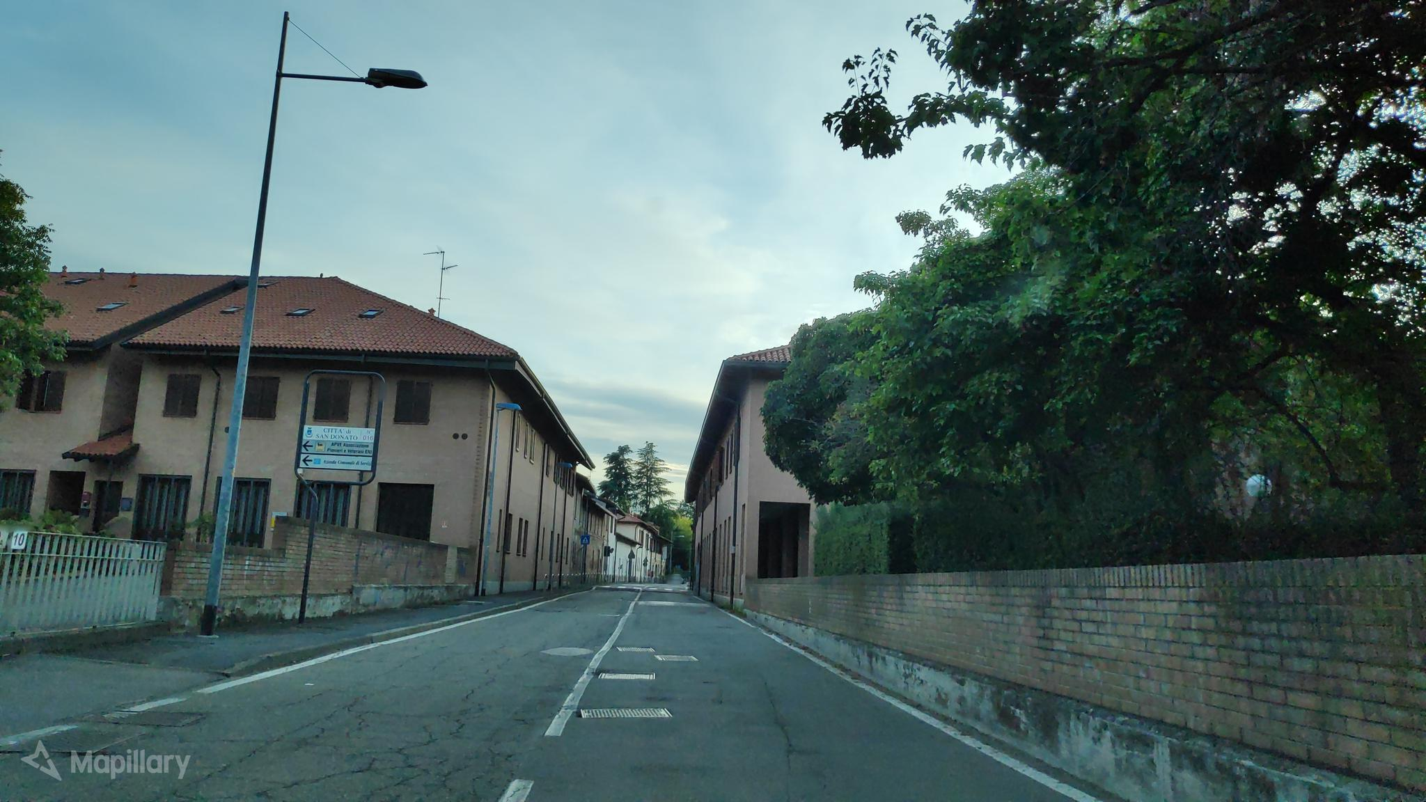 Via Unica Bolgiano (San Donato Milanese)